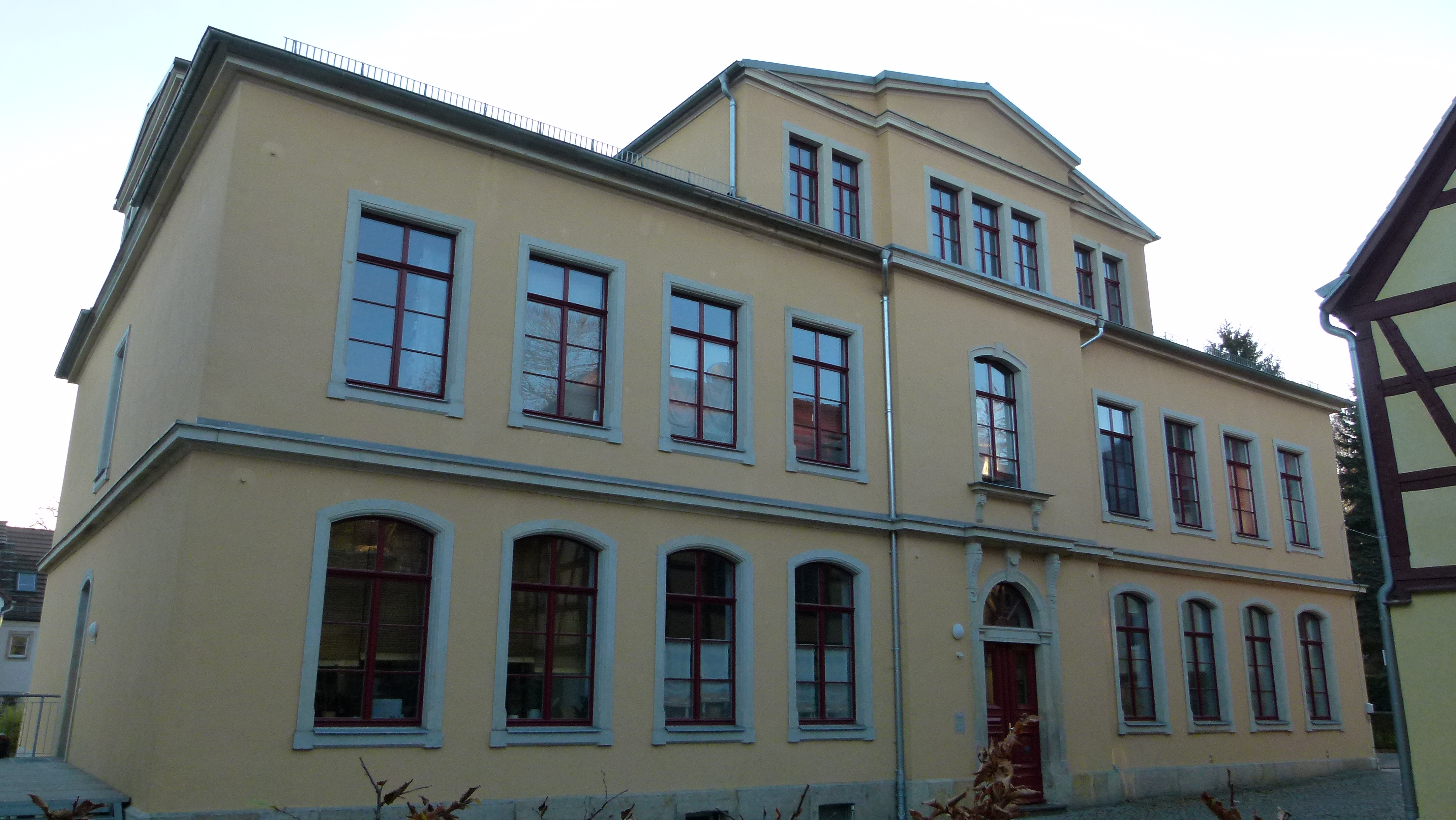 Denkmalgeschütztes Haus, Leßkestraße 1, Gorbitz, Dresden